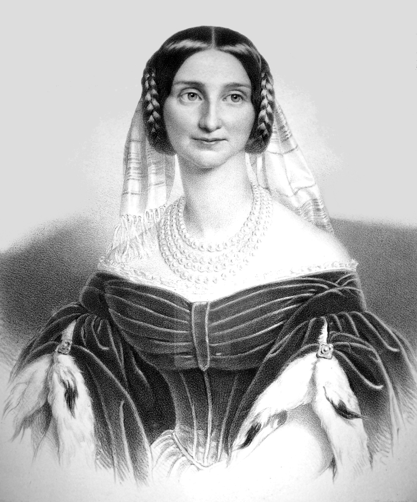 Eugenie von Hohenzollern-Hechingen